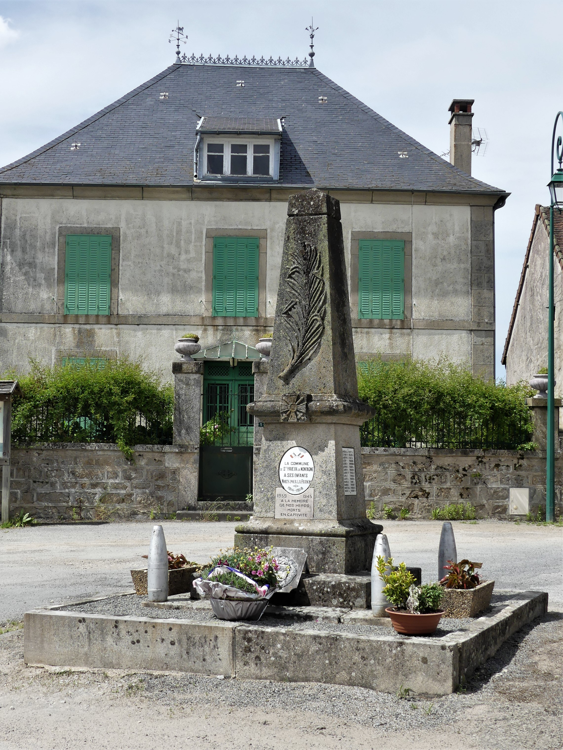 Le monument aux morts de Saint-Yrieix-la-Montagne, Creuse, France.